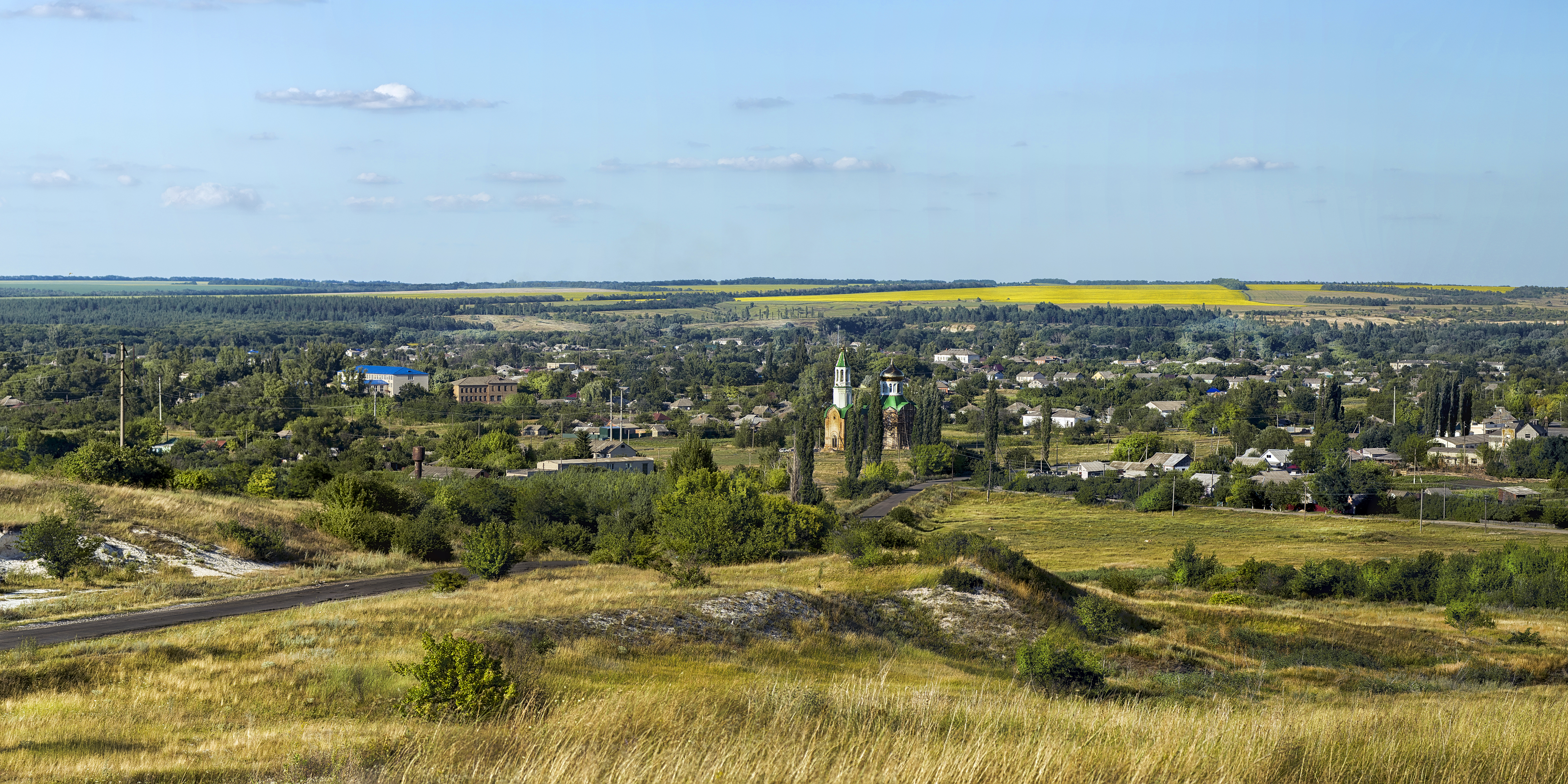 Білолуцький, Новопсковський район, ДП «Старобільське ЛМГ»